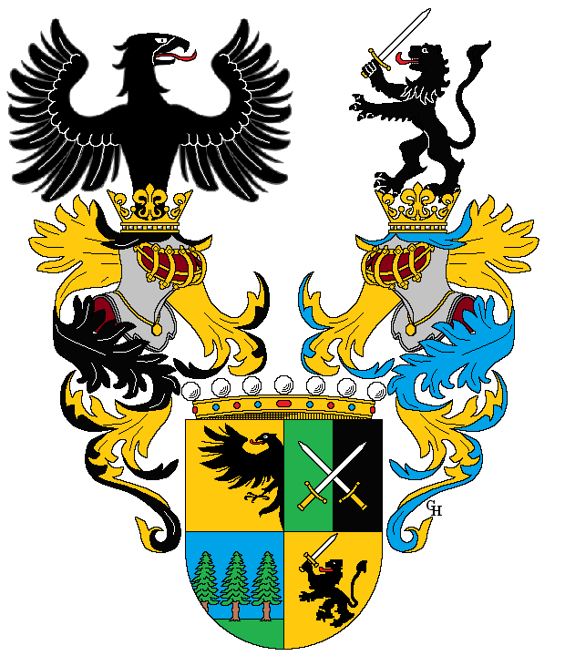 Wappen des österreichisch-ungarischen Feldzeugmeisters Hubert von Czibulka (1842–1914), verliehen anlässlich seiner Erhebung in den österreichischen Freiherrenstand 1882. Zeichnung von Gerd Hruška ( Für weitere Informationen zu dieser Standeserhebung siehe (